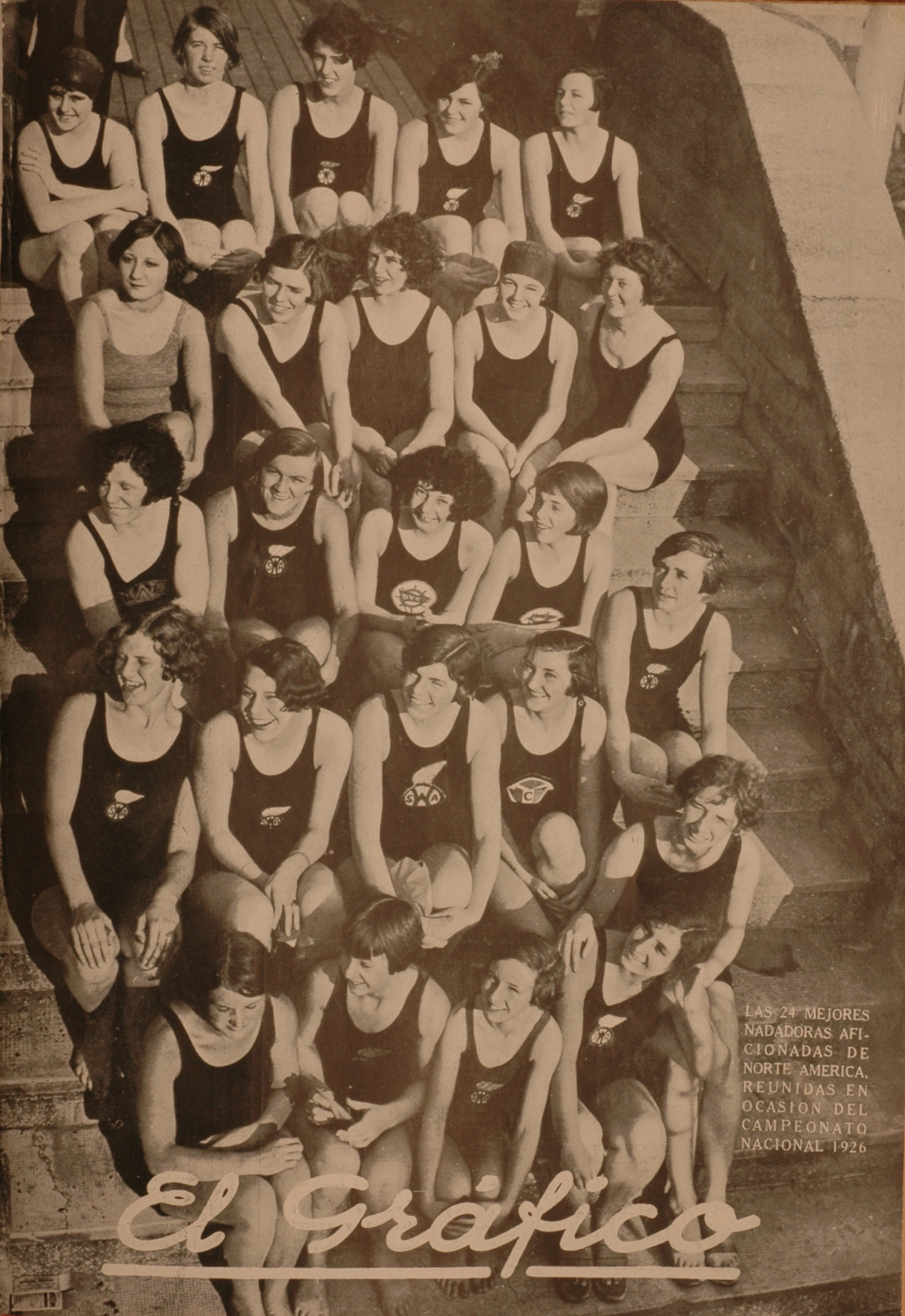 El Grafico del 13 de Marzo de 1926. Edicion 349